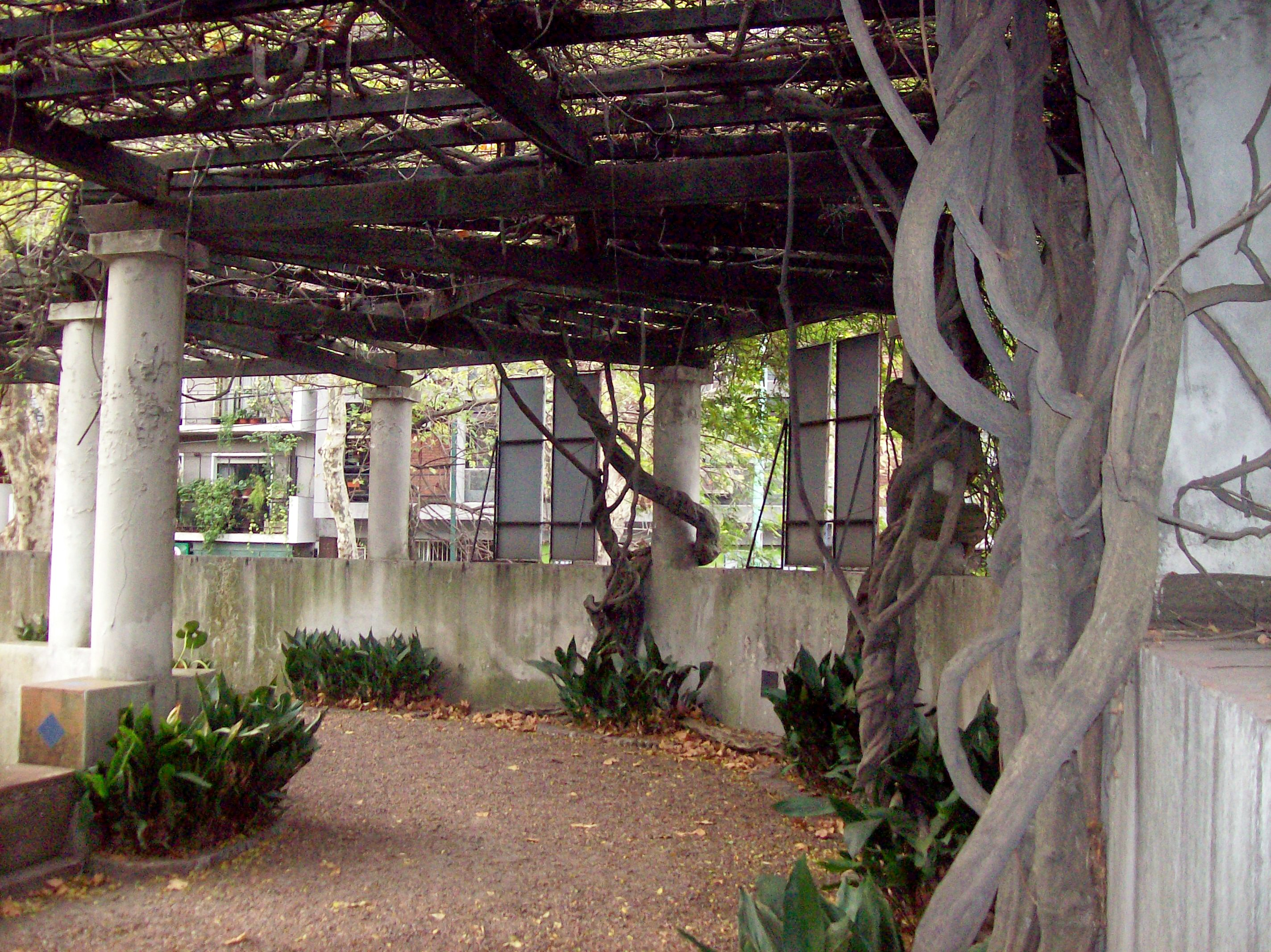 Wisteria floribunda o glicina centenaria en el Museo Larreta, Buenos Aires, Argentina